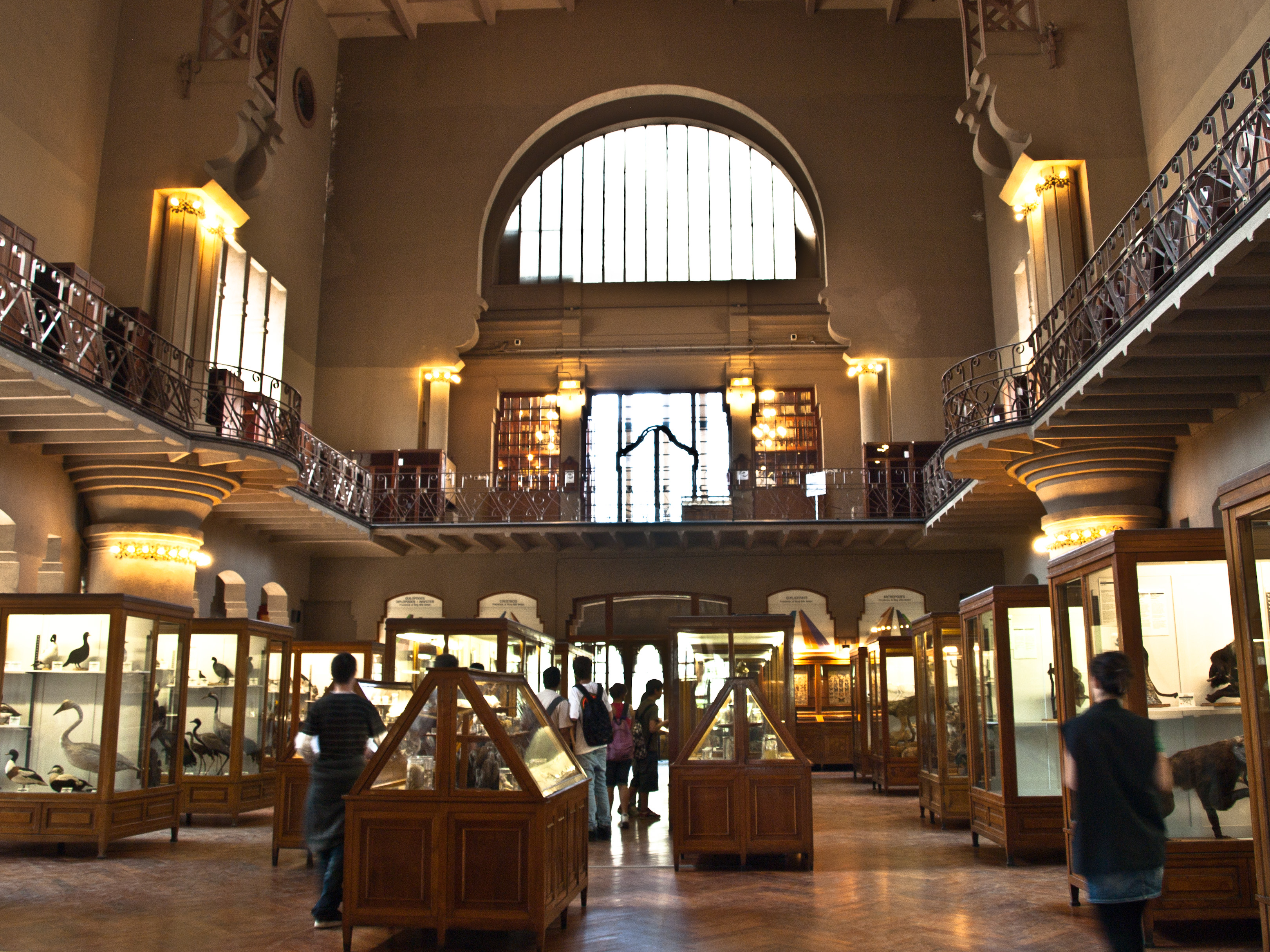 Interior de l'antic museu de zoologia, dins del castell dels tres dracs